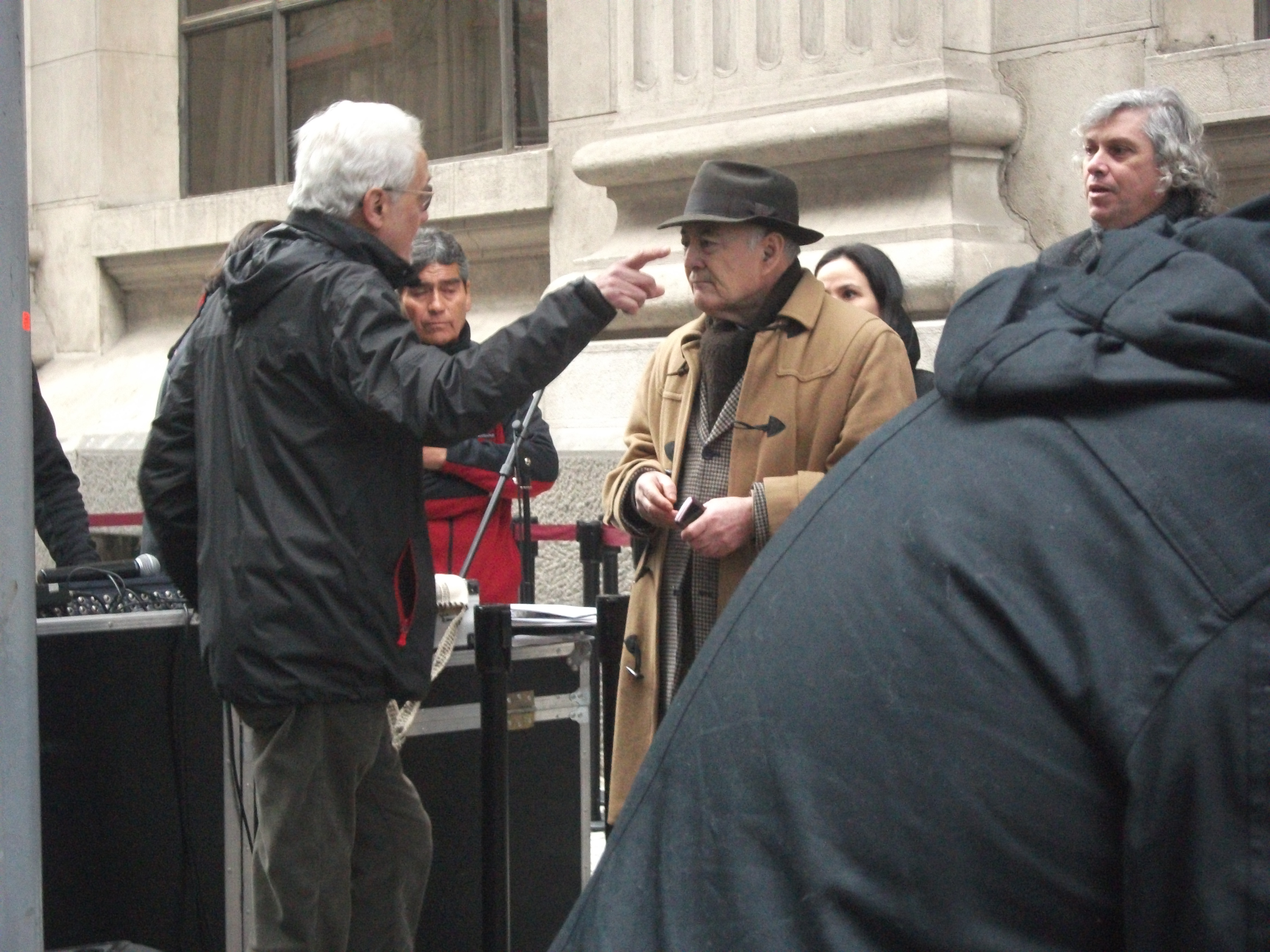 El periodista Ernesto Carmona participa el sábado 29 de Junio del año 2013, en un acto en recuerdo del asesinato del periodista-camarógrafo Leonardo Henrichsen, actividad organizada por la Municipalidad de Santiago de Chile